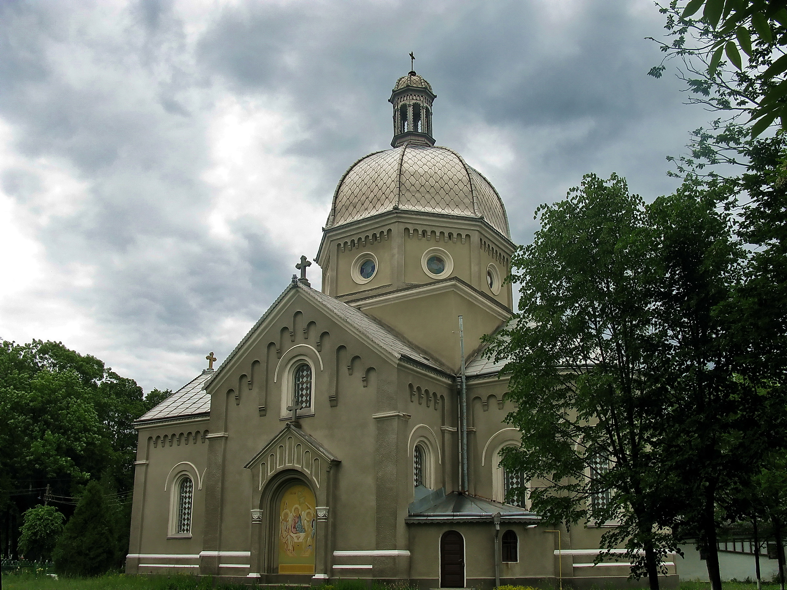 Церква (Свято-Георгіївська) (мур.), м. Сторожинець, вул. Т. Шевченка, 30